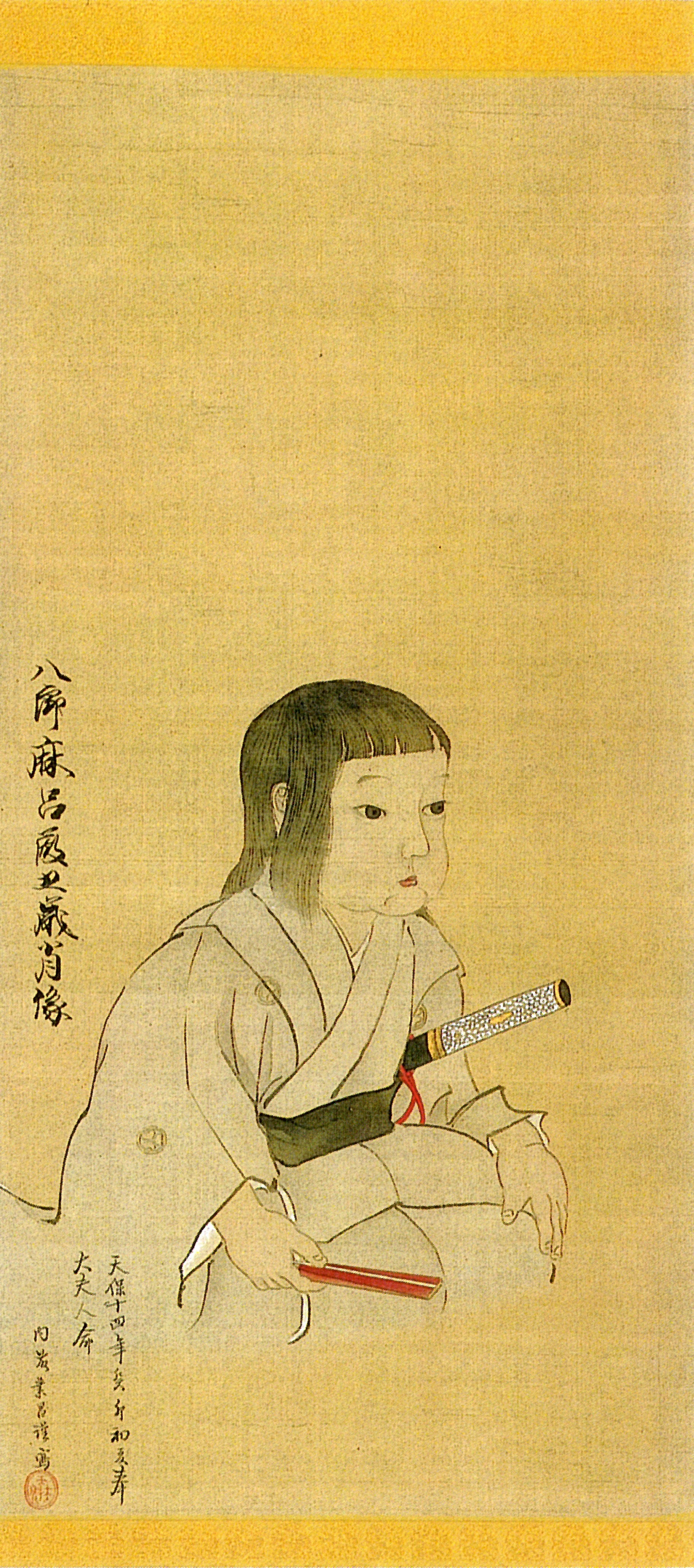 松平直侯(八郎麿)の五歳の時の肖像。